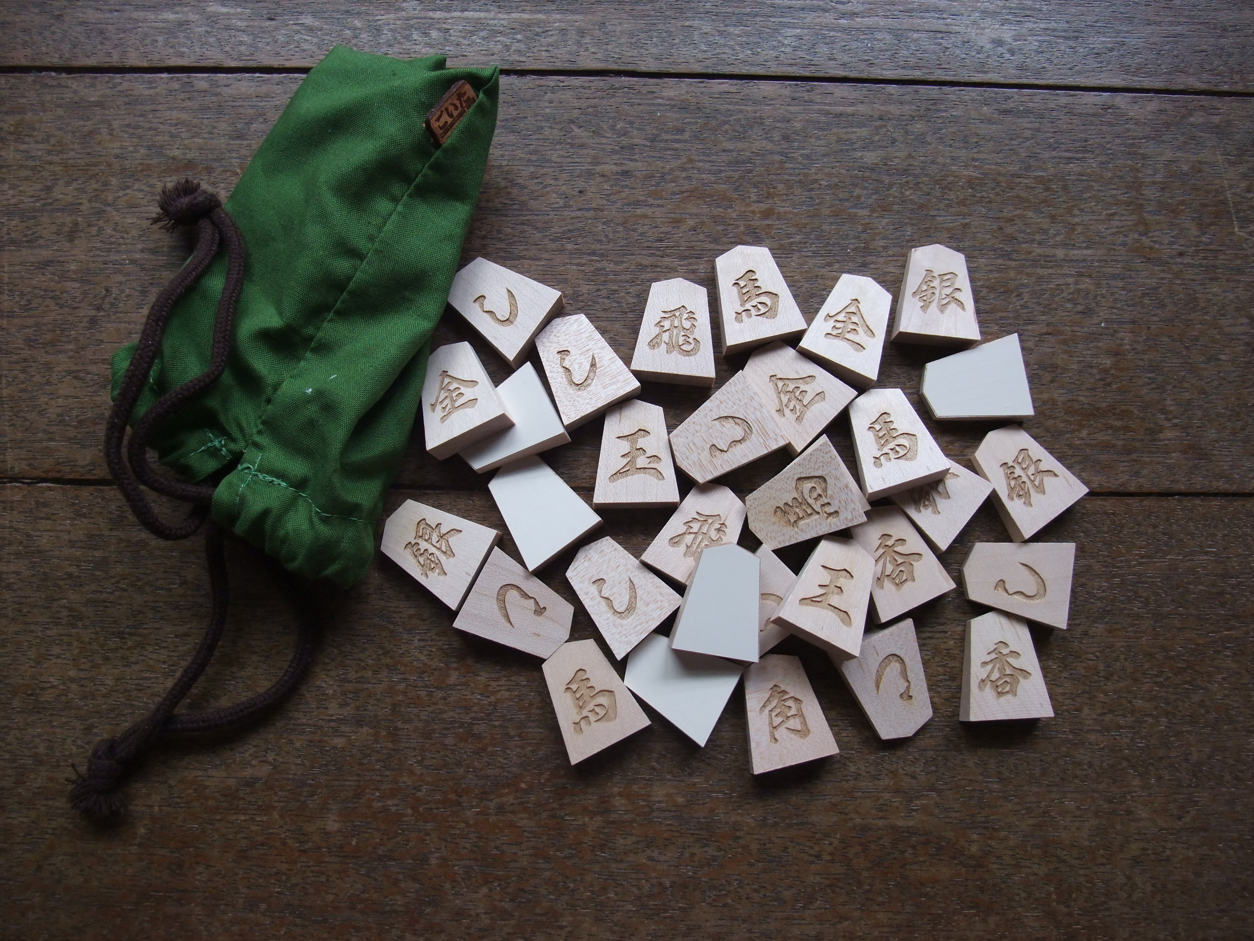 中文（台灣）: 娛慰多牌具